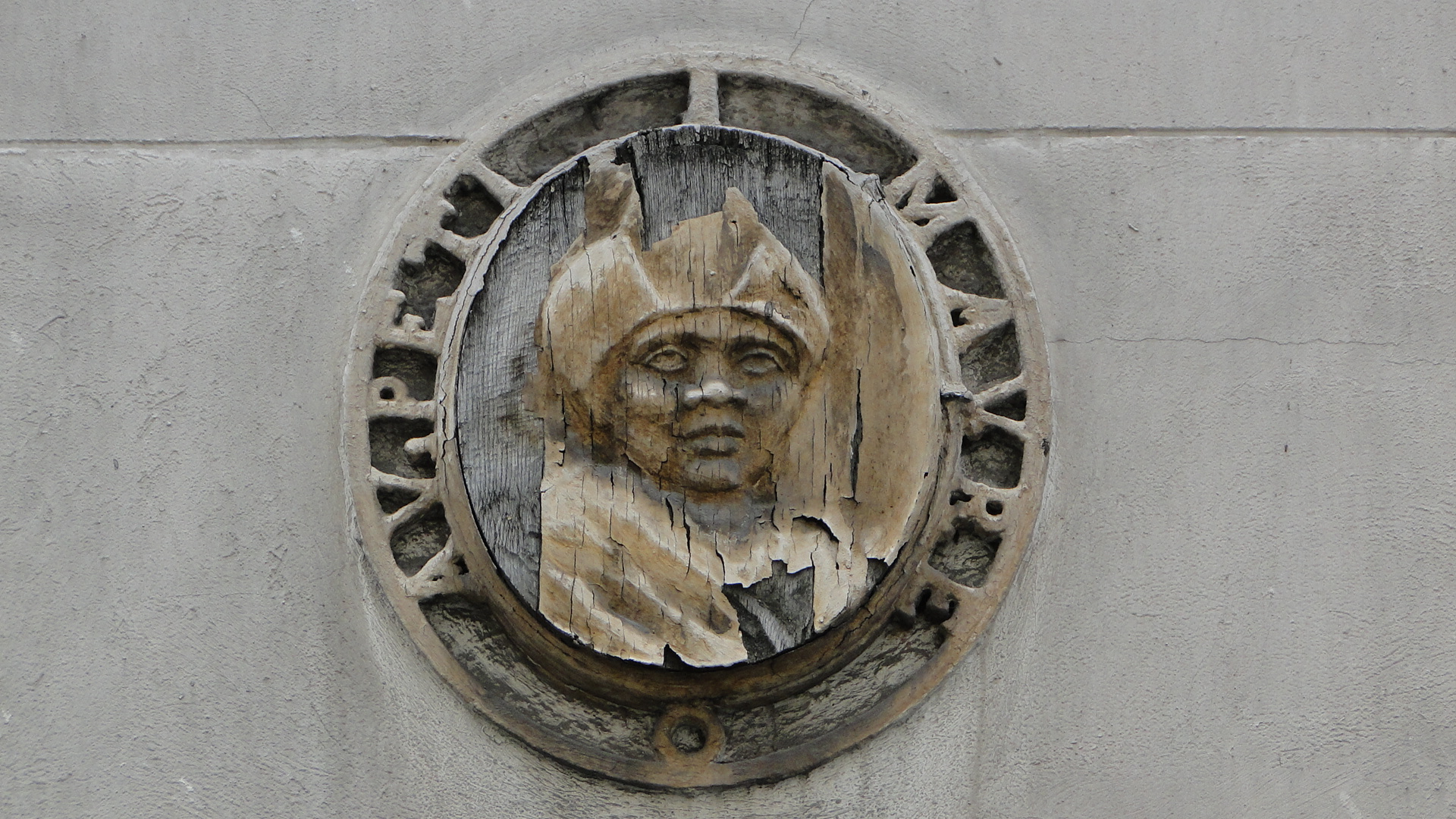 Enseigne de pierre de l'ancien débit de boisson Au Petit Maure, 26 rue de Seine, VIe arrondissement, Paris, France. .